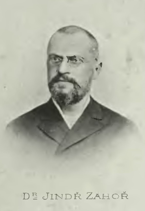 Portrét – Jindřich Záhoř (1844-1927), Český lékař .